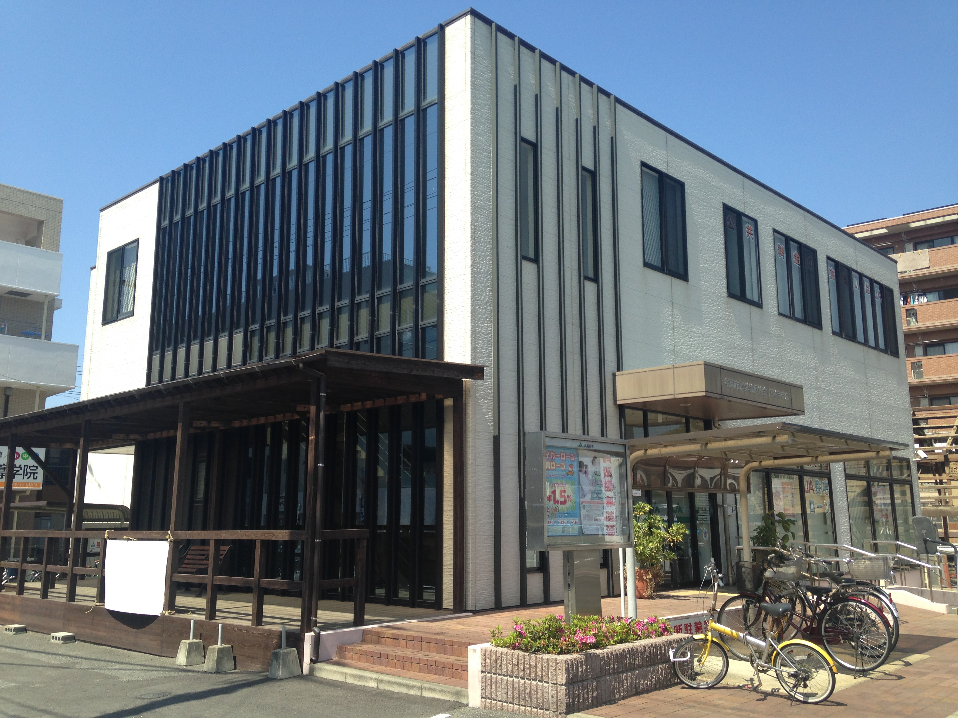 JA福岡周船寺支店